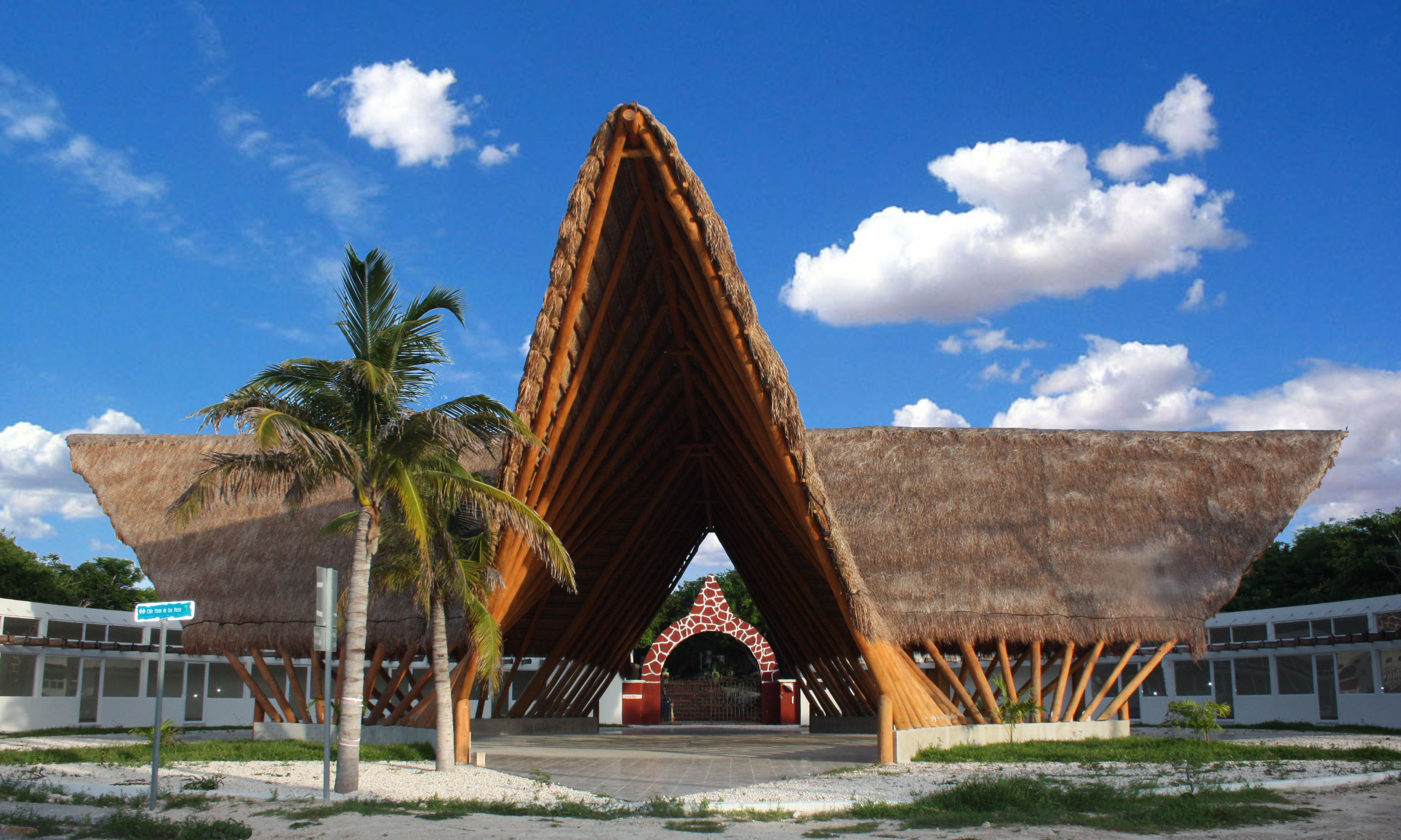 Fachada de la hacienda mundaca en Isla Mujeres Quintana Roo